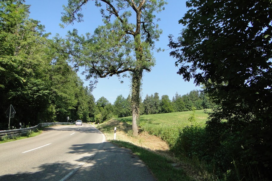 Deutsche Alpen Strasse by Scheidegg